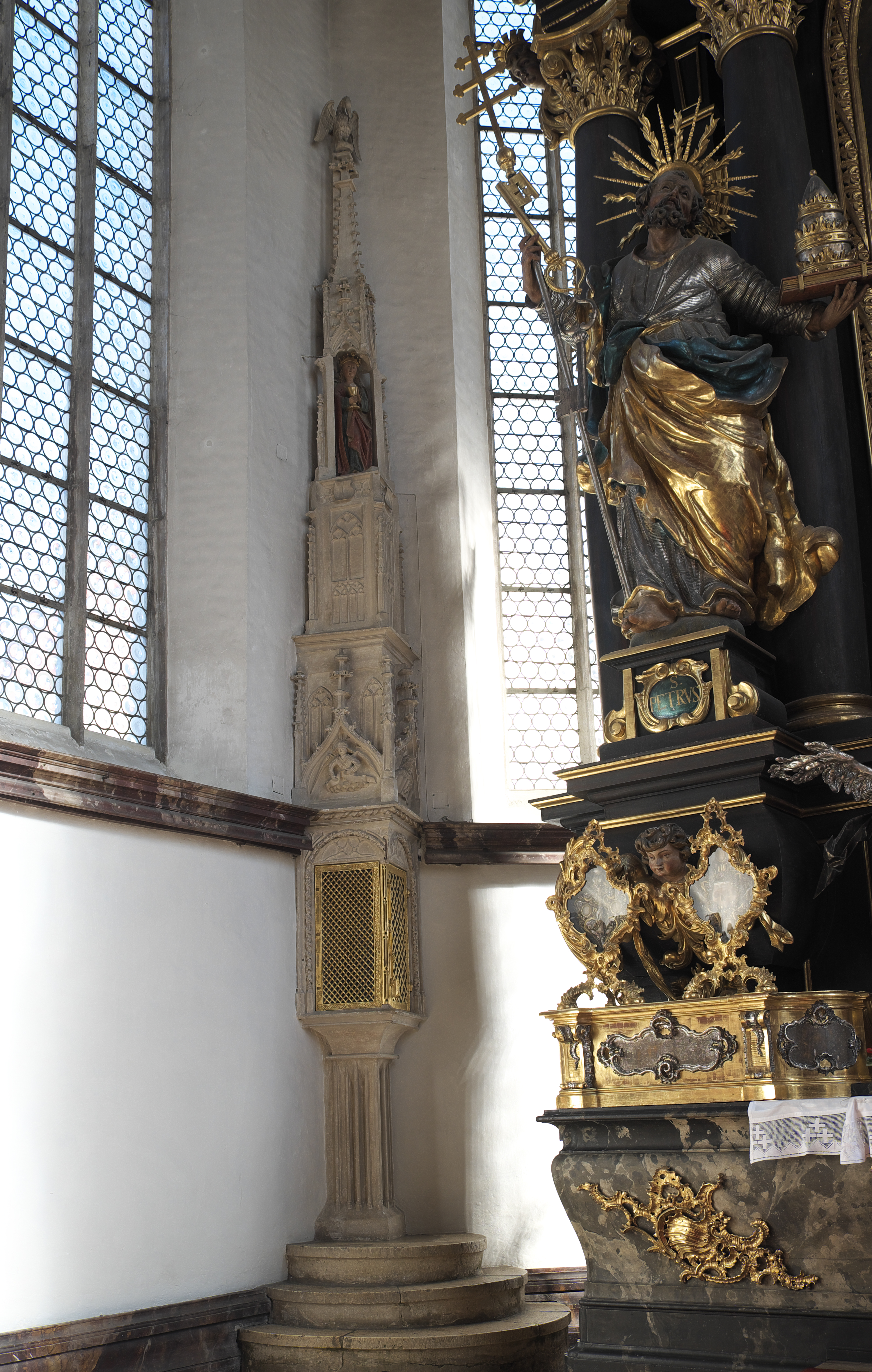 Katholische Stadtpfarrkirche Mariä Himmelfahrt in Höchstädt im Landkreis Dillingen an der Donau (Bayern), Sakramentshaus aus Sandstein, um 1480/90, mit Holzfigur der hl. Barbara, Ende 15. Jahrhundert